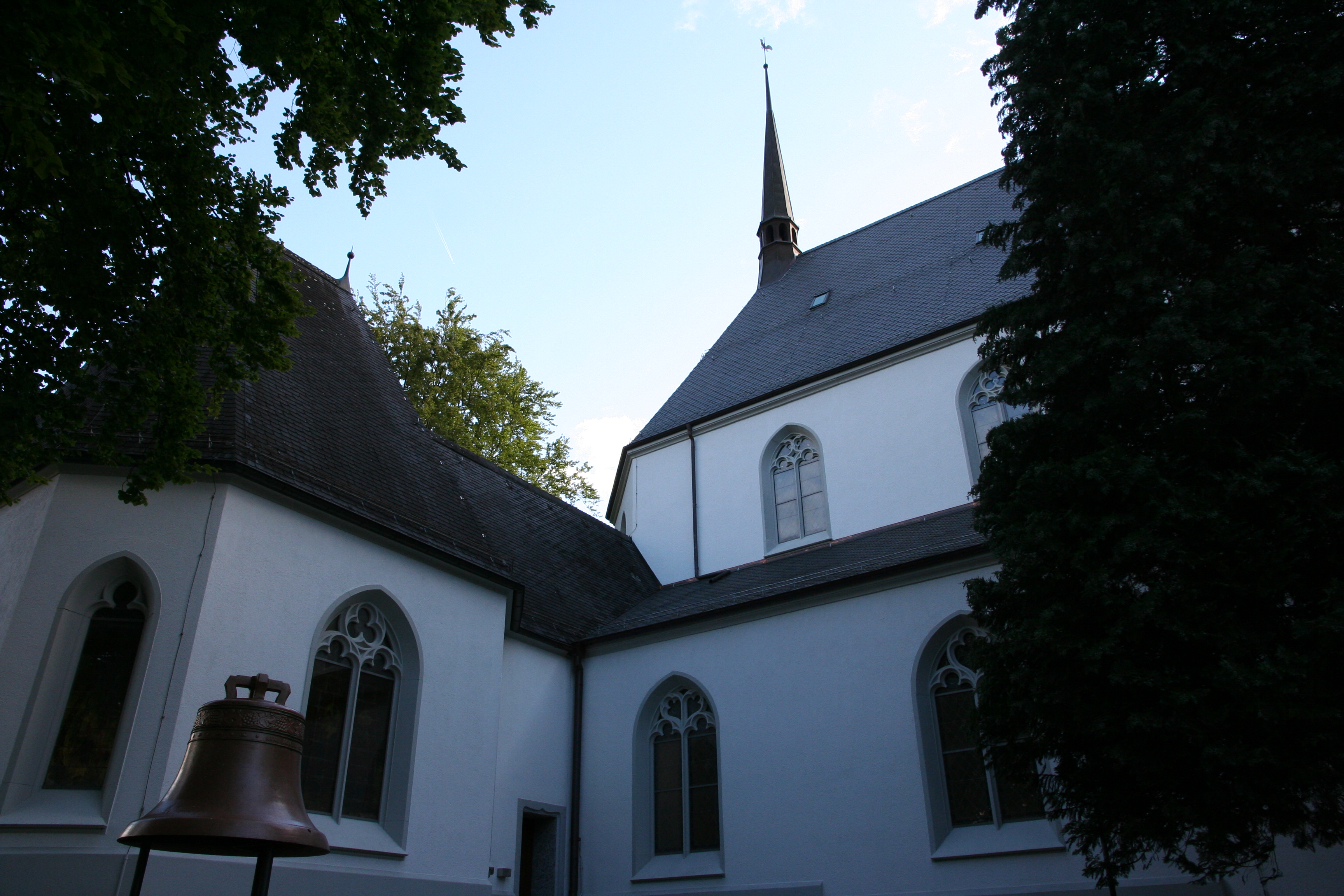 Römisch-katholische Pfarrkirche Hl. Dreifaltigkeit Adliswil, Kapelle